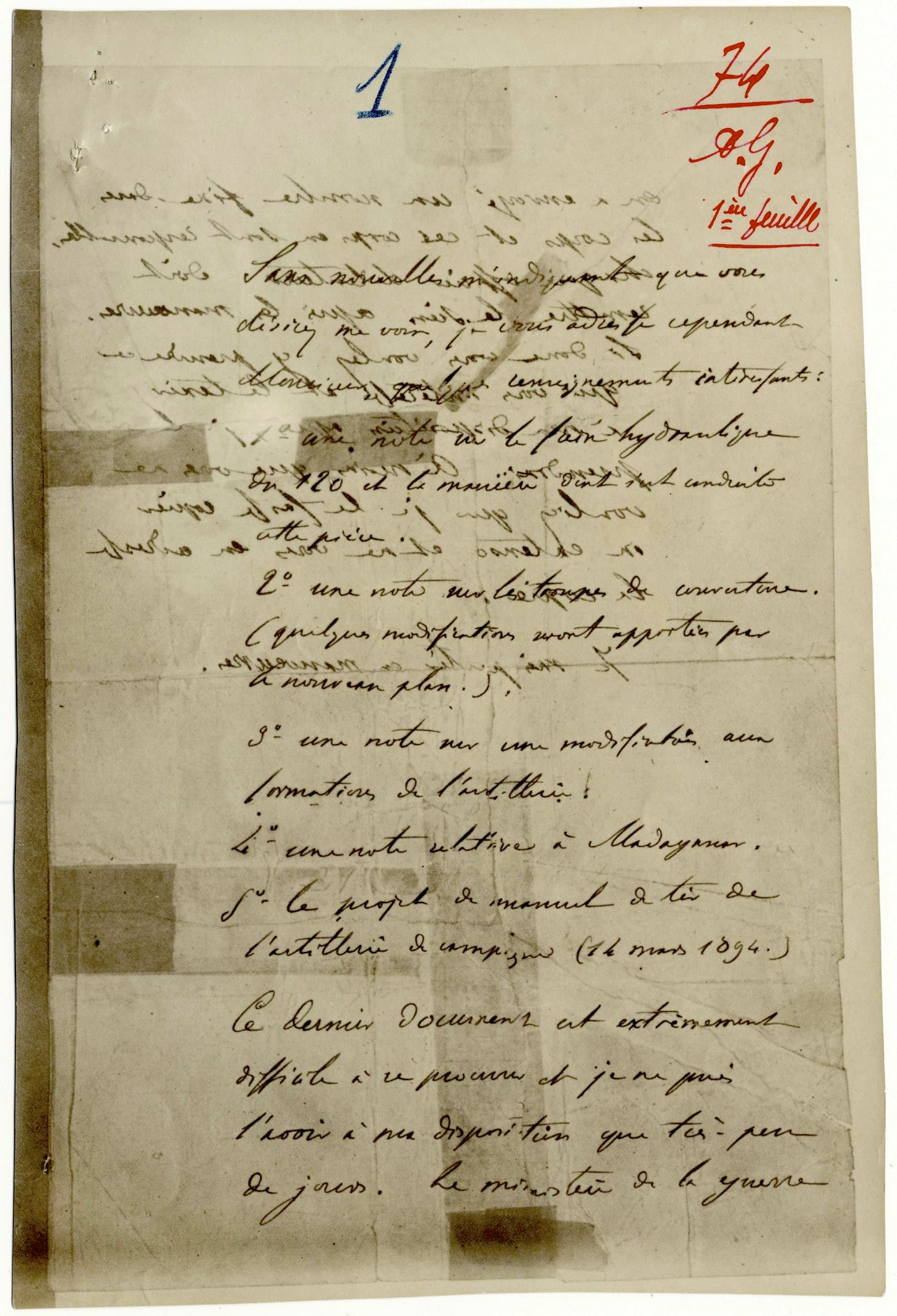 Photographie du recto de la lettre manuscrite non signée adressée en août 1898 à l'attaché militaire de l'ambassade d'Allemagne à Paris, dite "le bordereau" et attribuée au commandant Esterhazy. Document provenant des archives du contre-espionnage militaire français, daté de la fin septembre 1894.